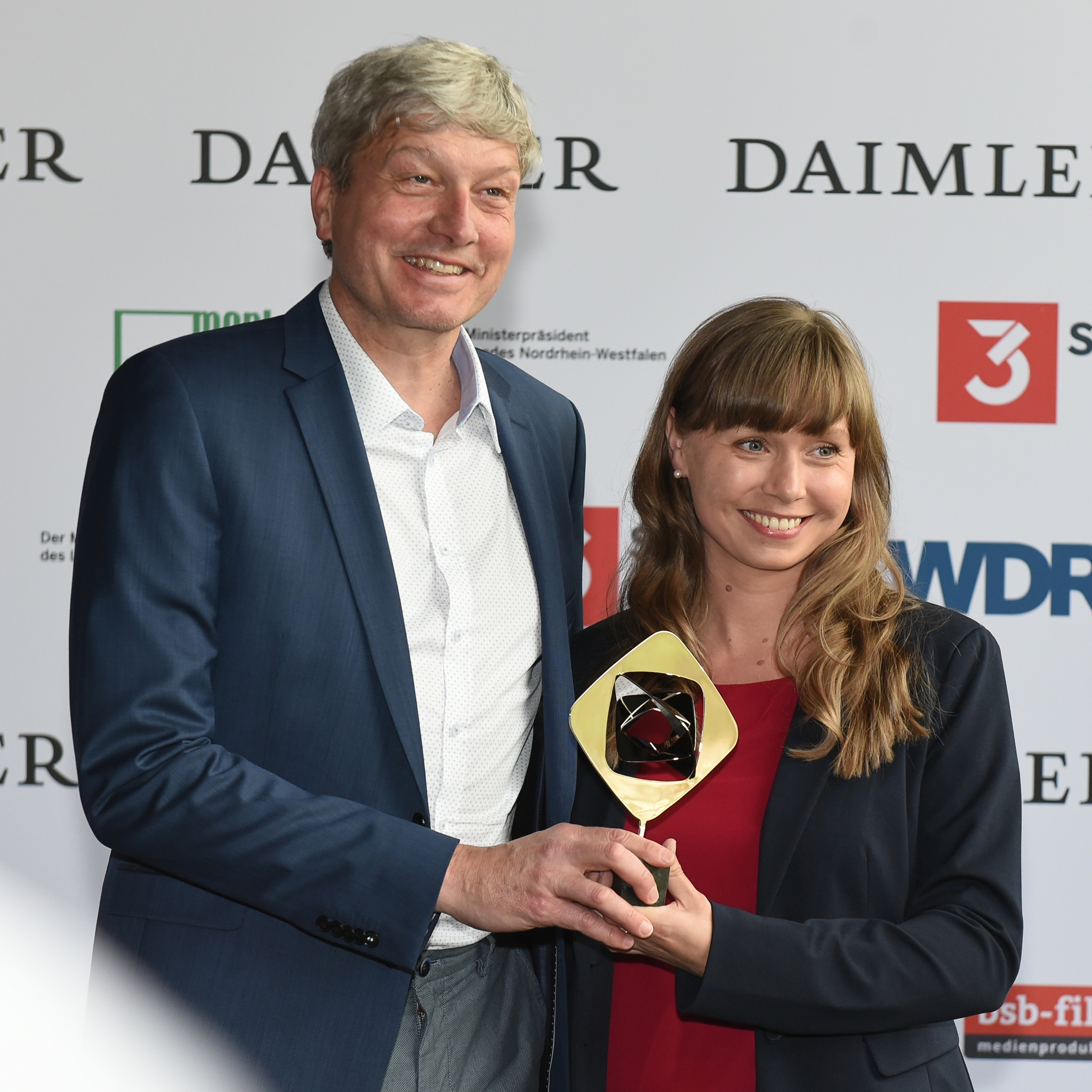 Verleihung des Grimme-Preises 2019.